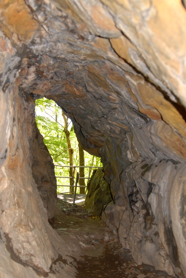 Die Prinzenhöhle.